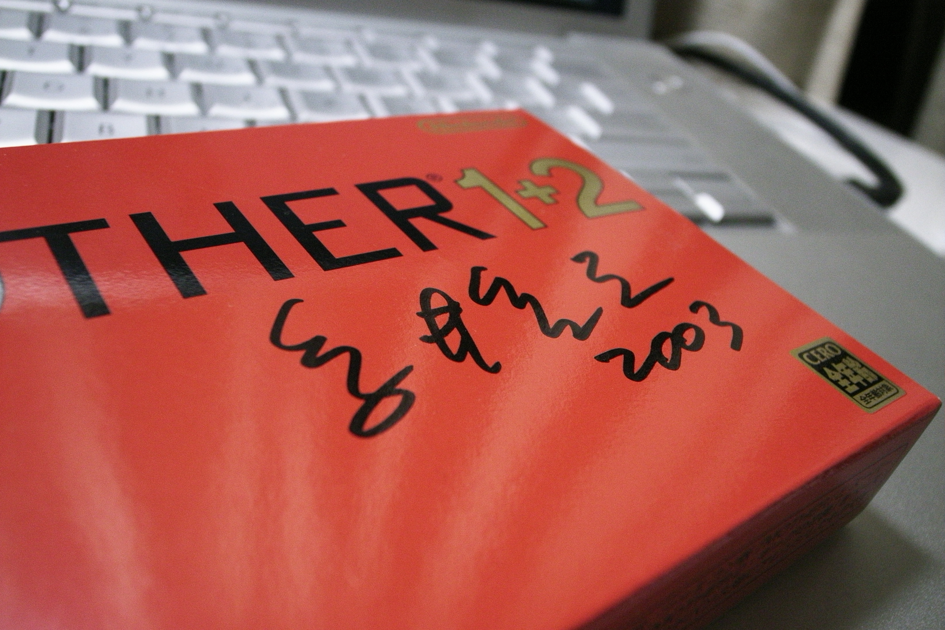 発掘した。